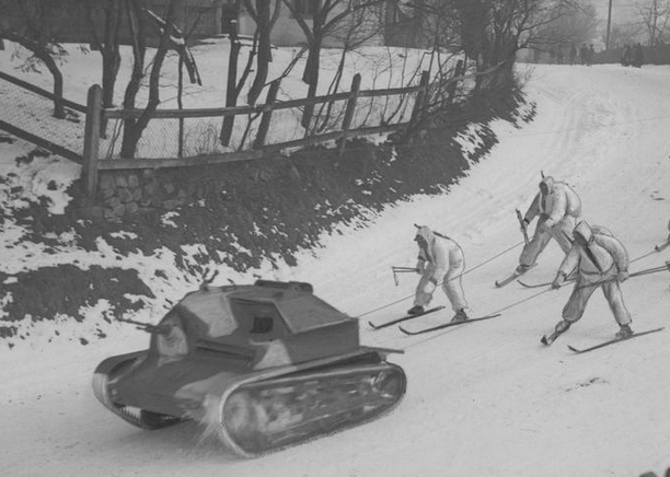 Żołnierze piechoty w zimowym umundurowaniu maskującym ciągnięci przez tankietkę TK-3. [opis oryginalny] Uwaga: Tankietka na zdjęciu to TKS.